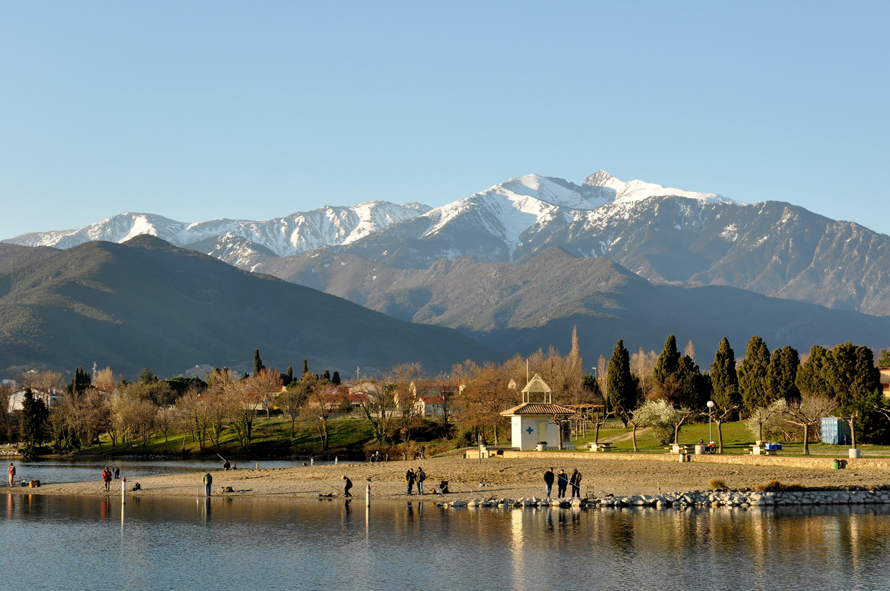 Vinça (France 66320)son lac de plaisance et le Canigou